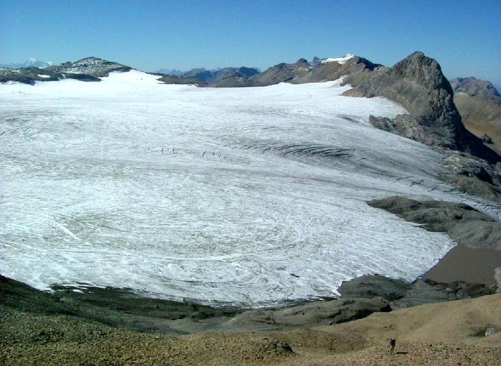 Plaine Morte Glacier, above Crans-Montana